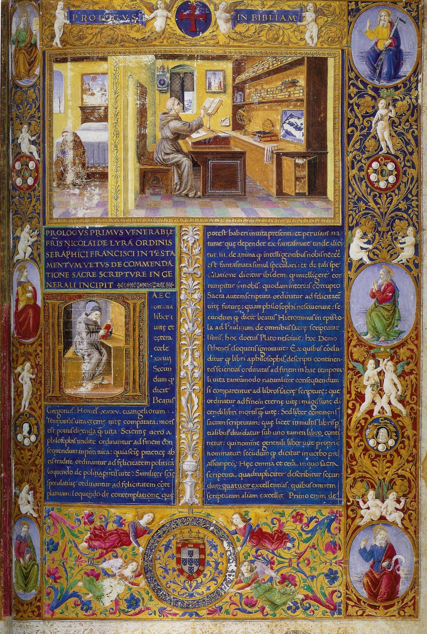 Bília dos Jerónimos, frontispício do volume I, livros do Pentateuco, painel com Nicolau de Lira no estúdio